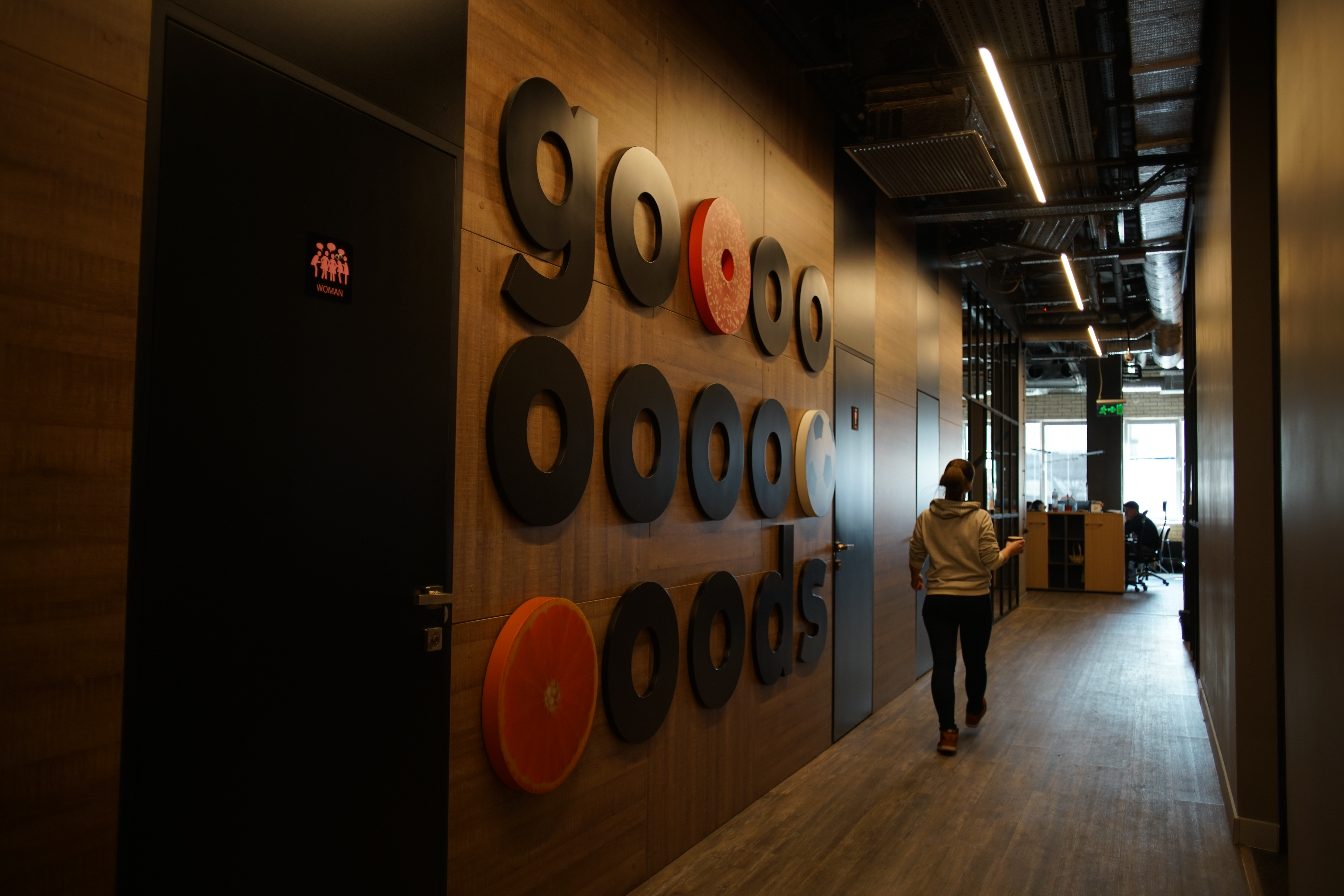 Офис Goods.ru